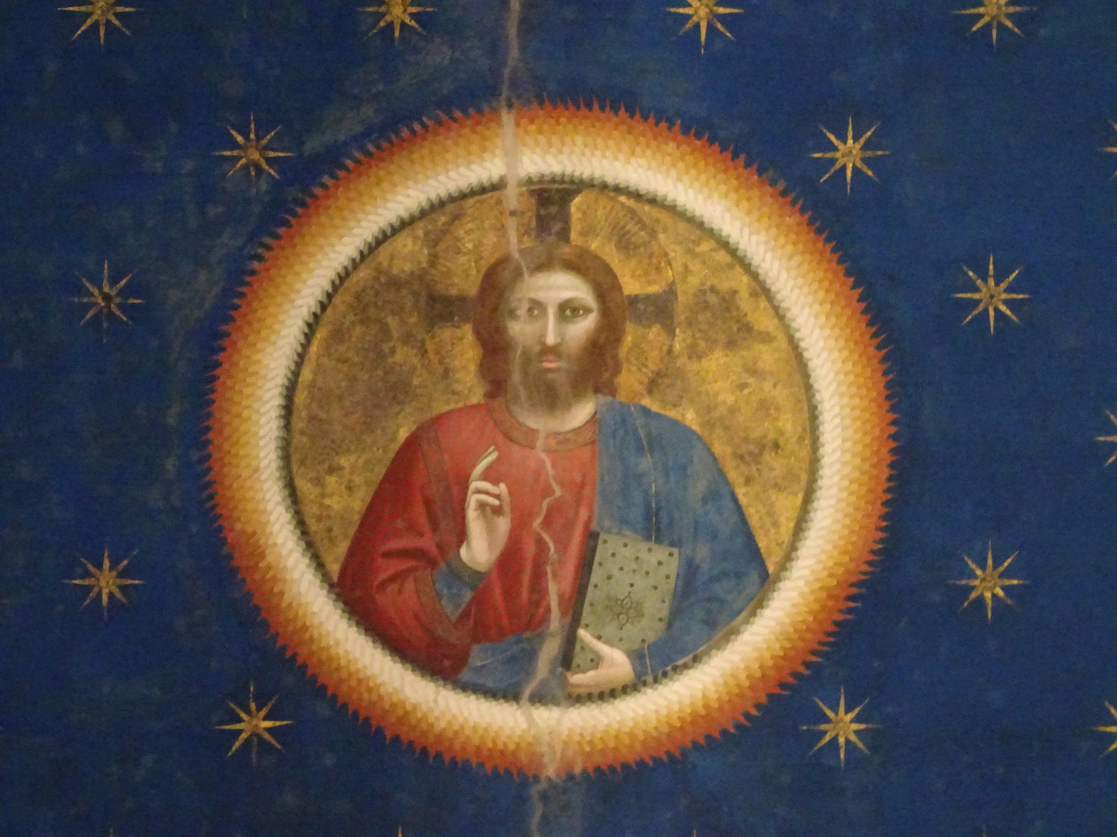 zegenende Christus te midden van sterrenhemel